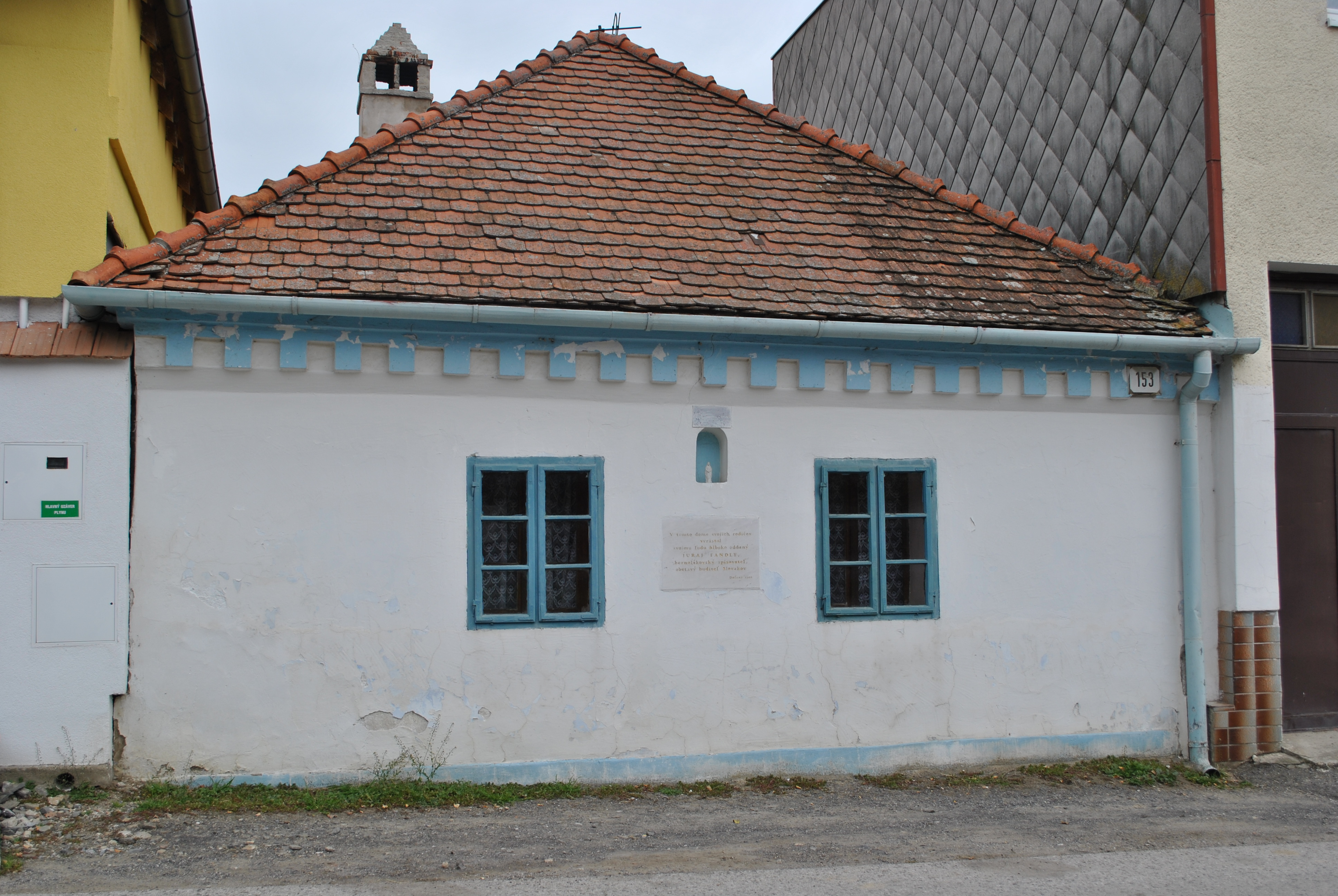 Dom rodičov Juraja Fándlyho s pamätnou tabuľou v Doľanoch